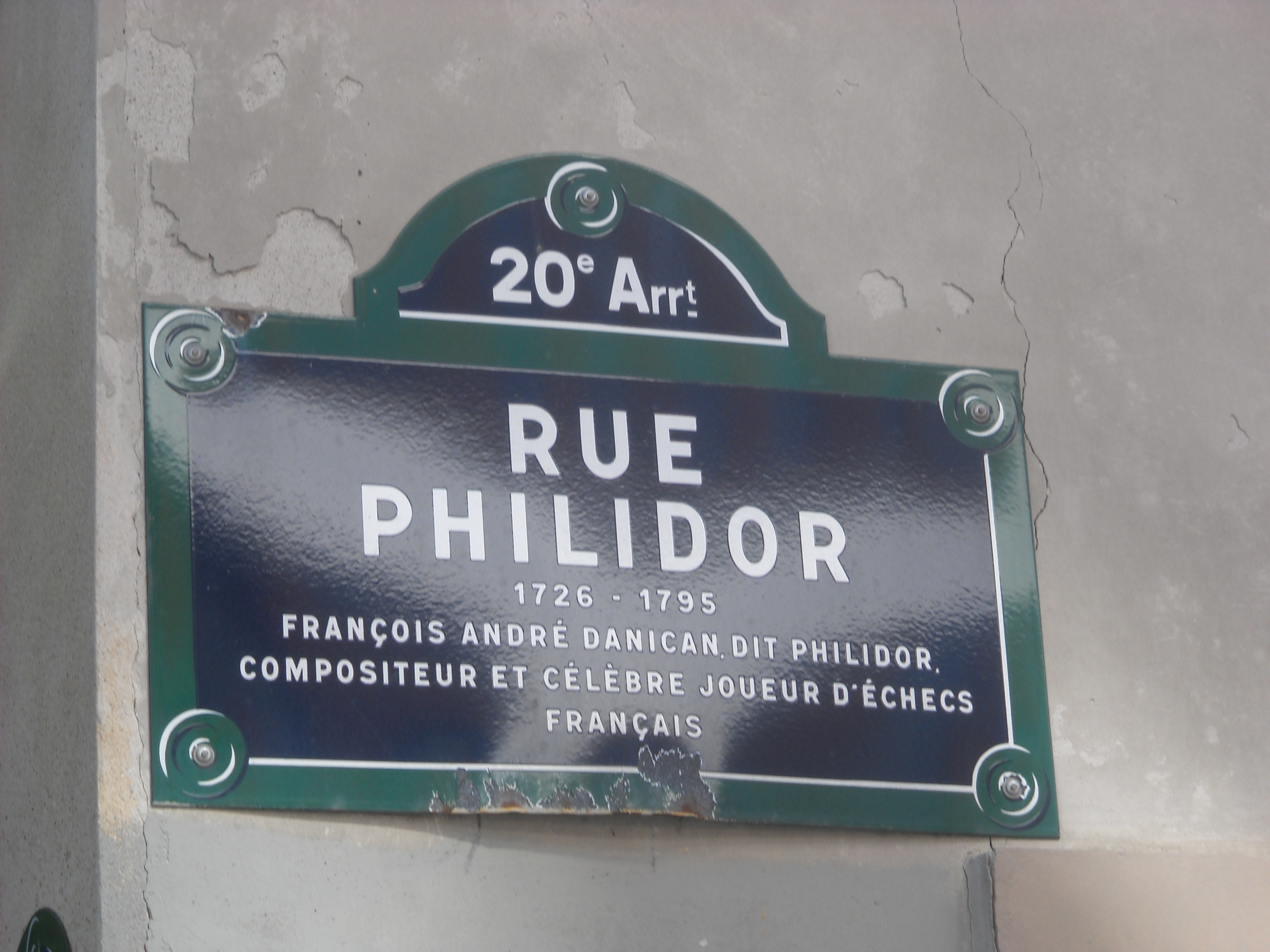 La plaque de la rue François-André Danican Philidor dans le 20ème arrondissement à Paris.